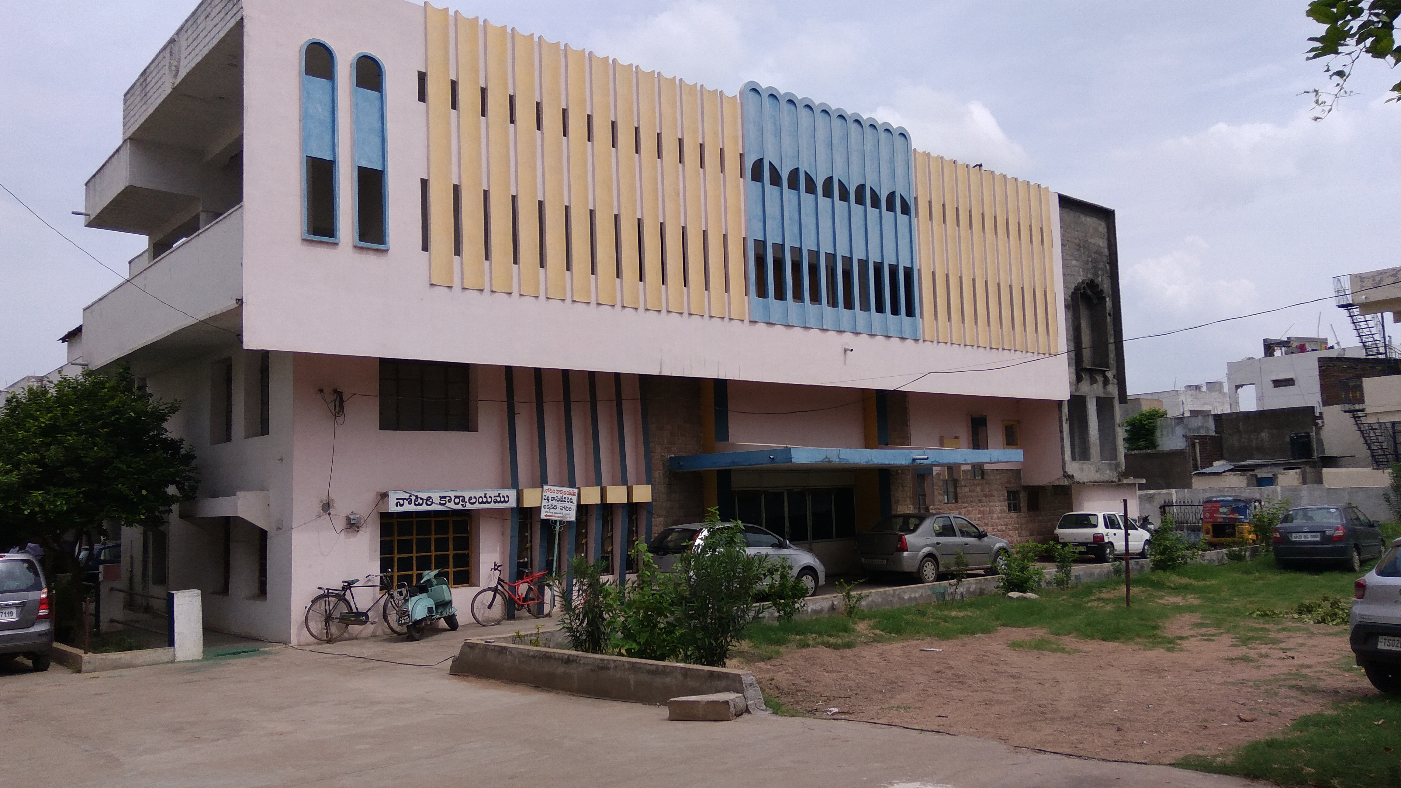 హుజురాబాద్ ఫంక్షన్ హాల్